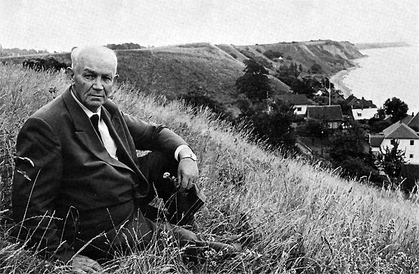 Gabriel Jönsson